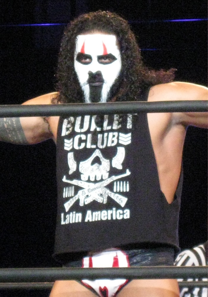 2015年3月22日 ベイコム総合体育館「Road to INVASION ATTACK 2015」タマ・トンガ